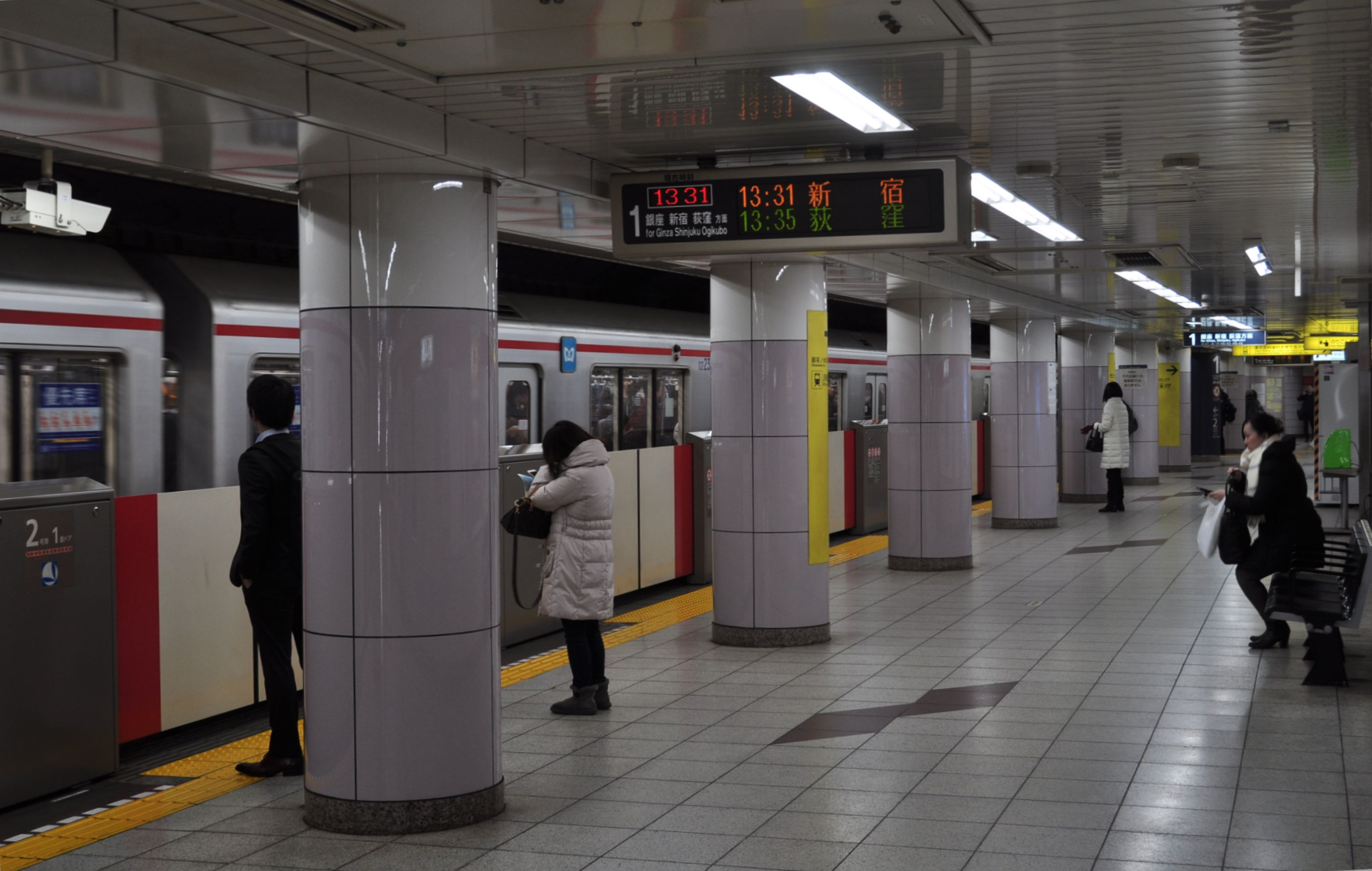 東京メトロ 御茶ノ水駅 Nikon D5000